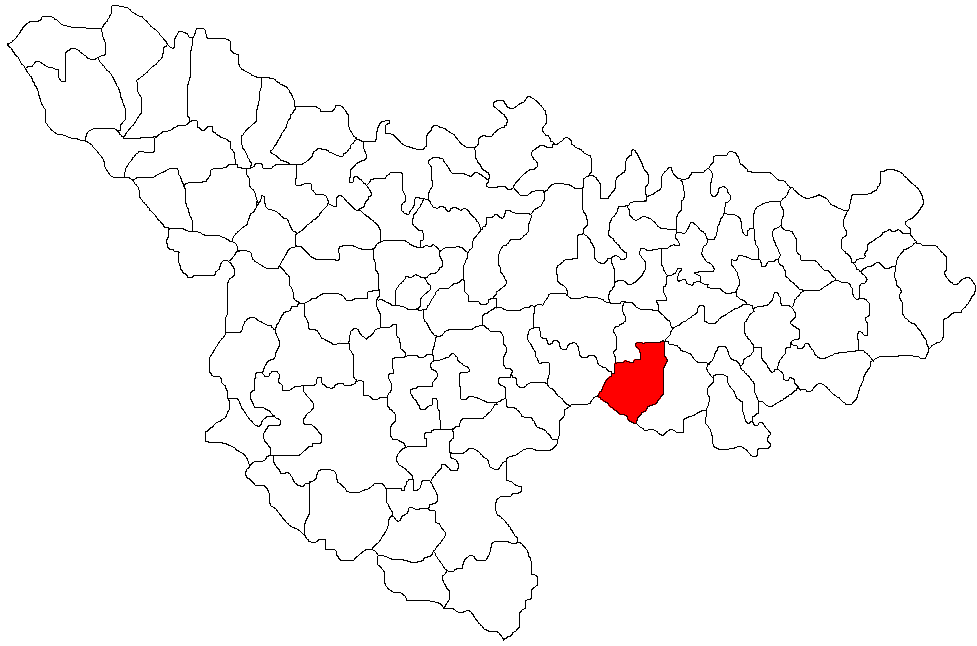 Darova, Timis Licensing Categorie:Hărţi ale judeţului Timiş